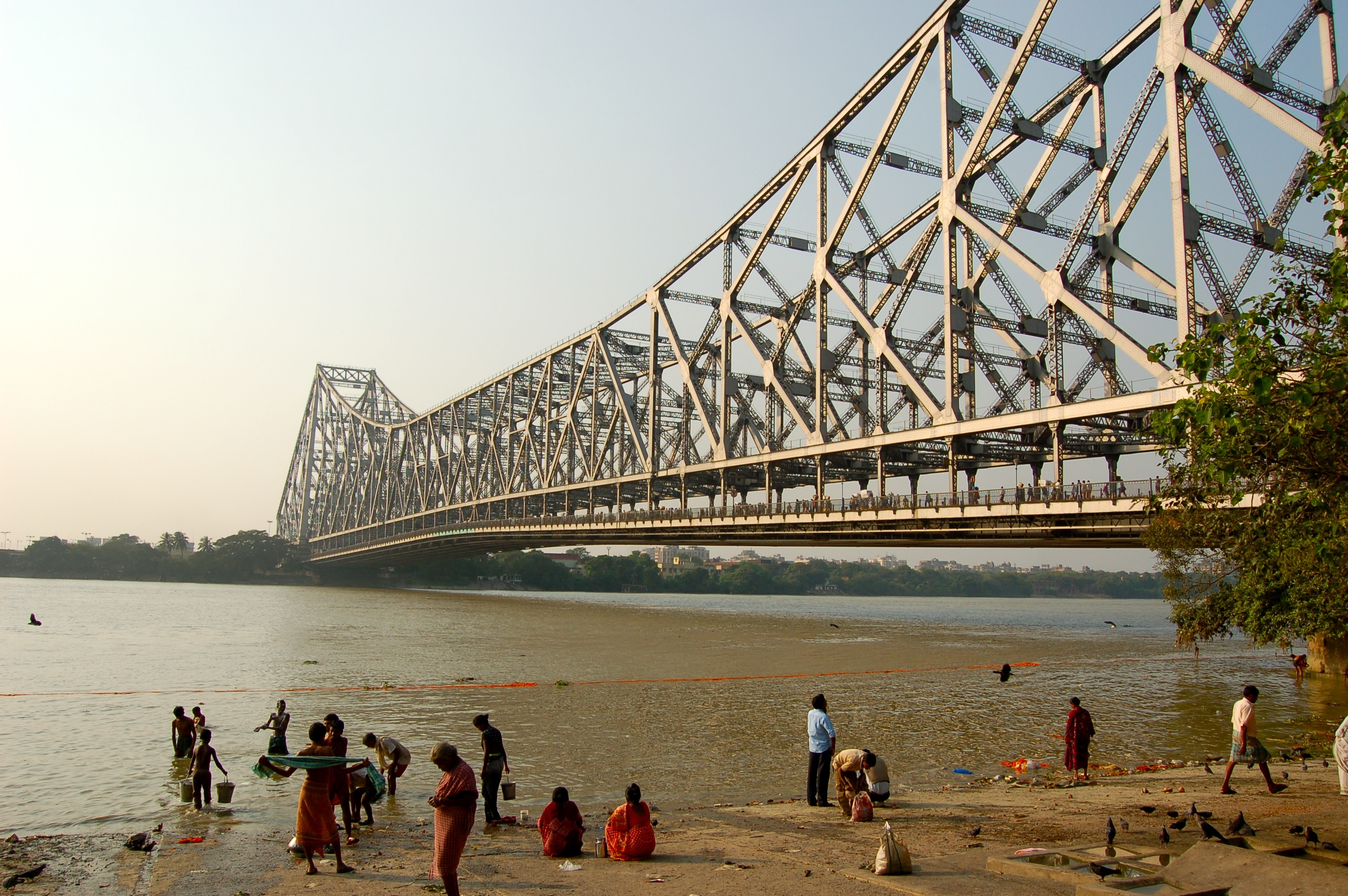 Howrah Bridge et les ablutions dans la Howrah